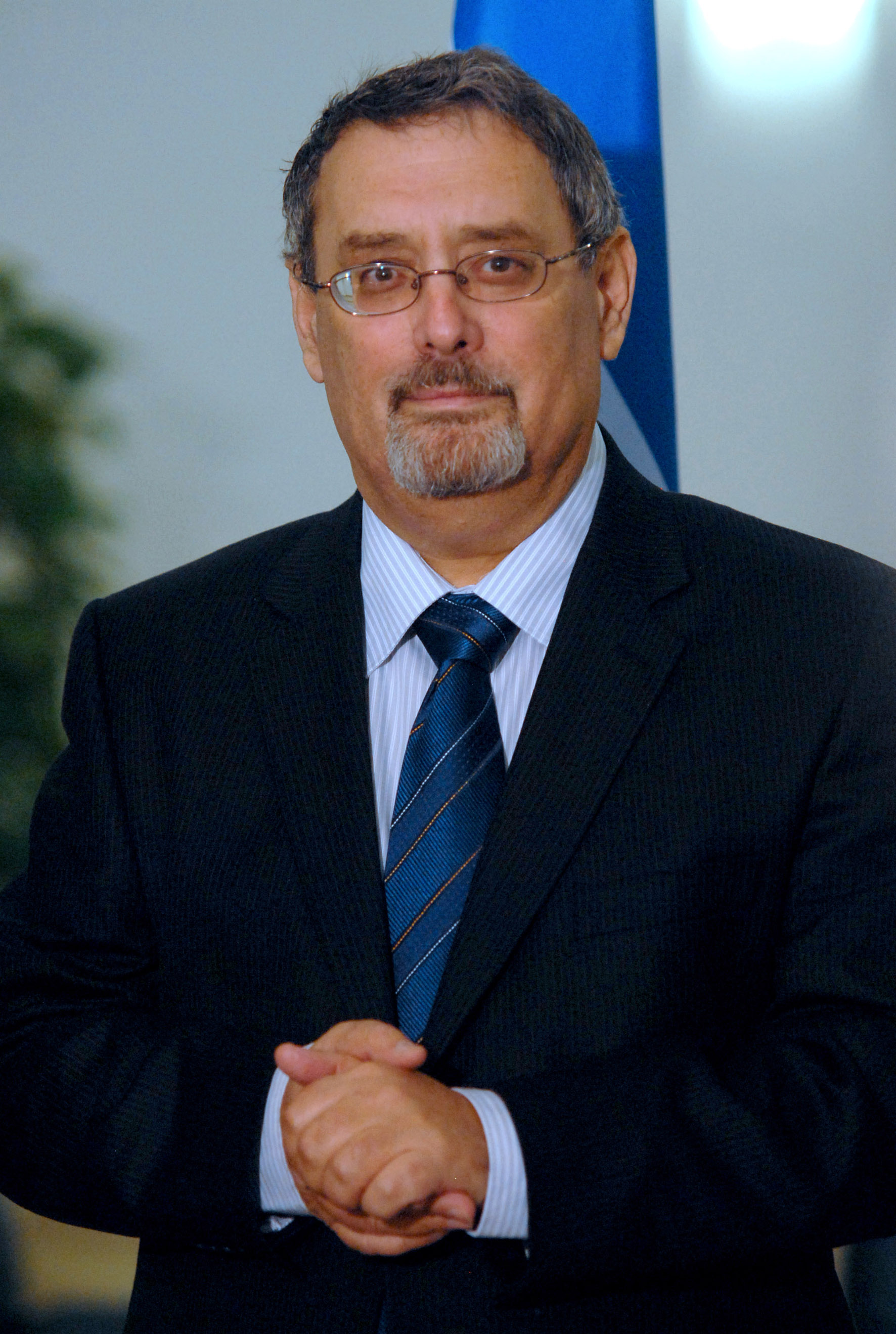 Brasília - Parlamentares entregam ao embaixador de Israel no Brasil, Giora Acher, manifesto em prol do restabelecimento da paz na Faixa de Gaza ...